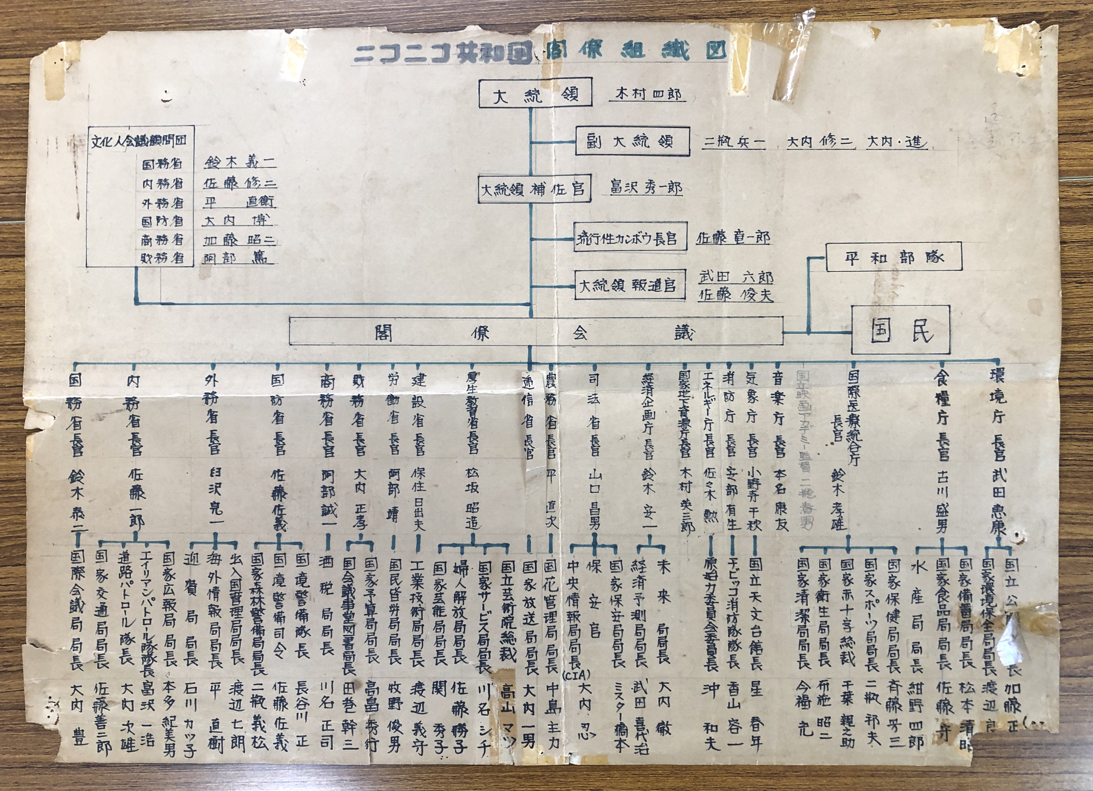 ニコニコ共和国に関する写真